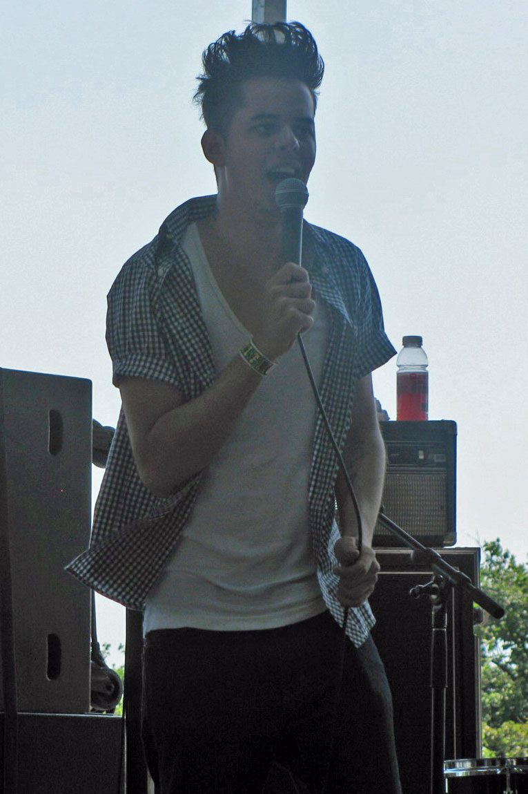 Esser performing at Lollapalooza 2009.